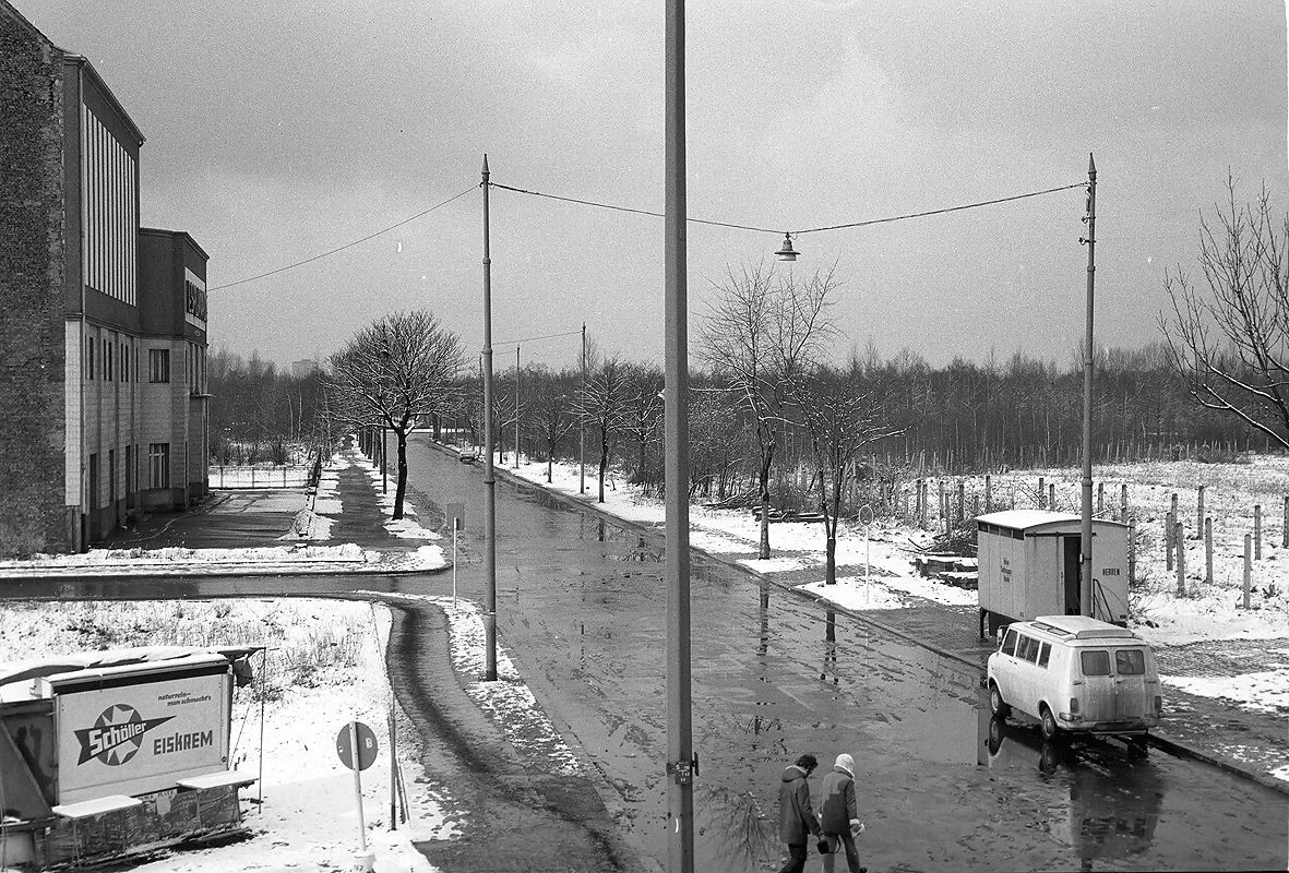 Die Bellevuestraße in der Nähe des Potsdamer Platzes, links das ehemalige Hotel Esplanade.